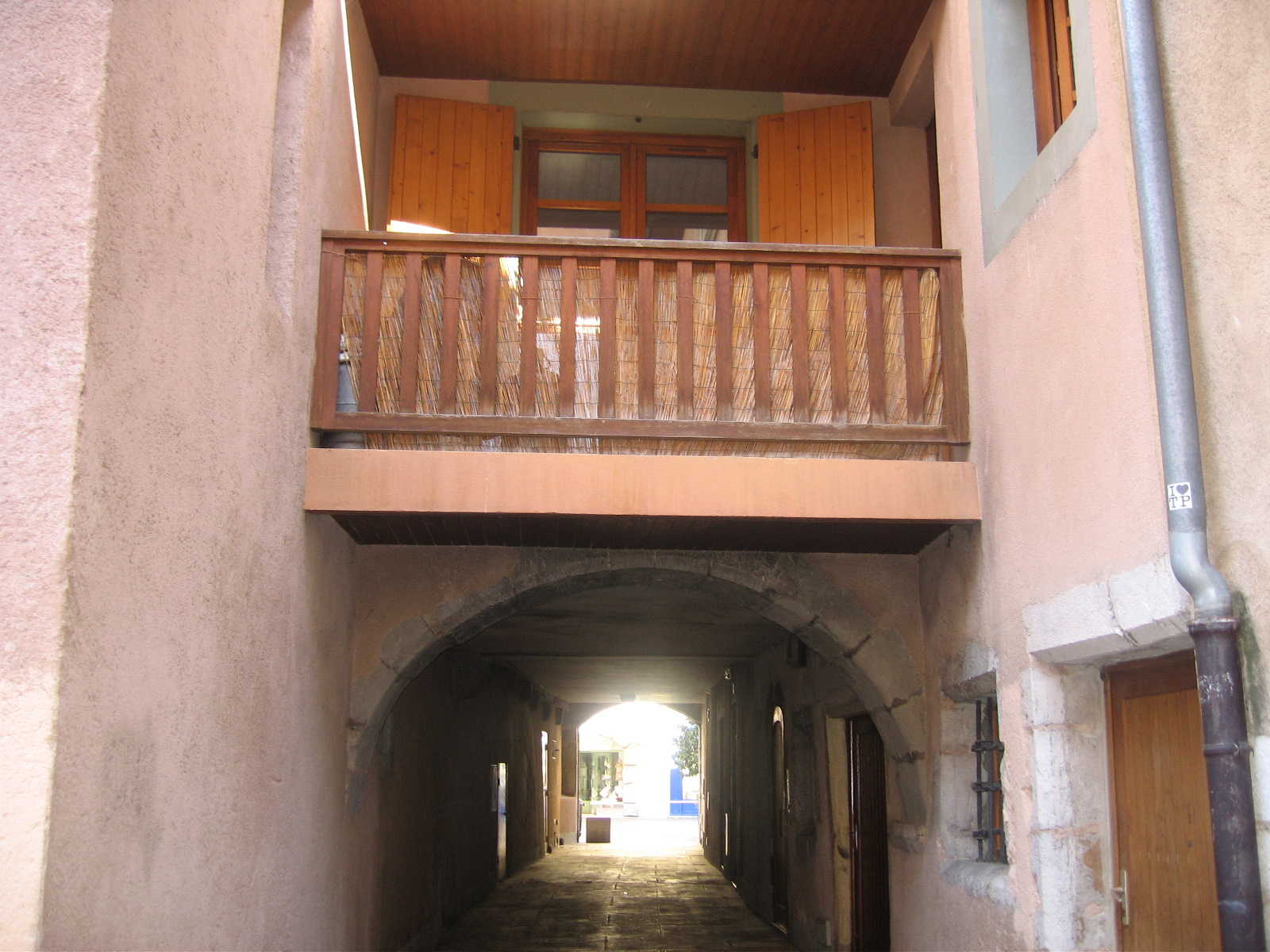 “Traboule” con balcón, en el barrio histórico de Chambéry (Francia).